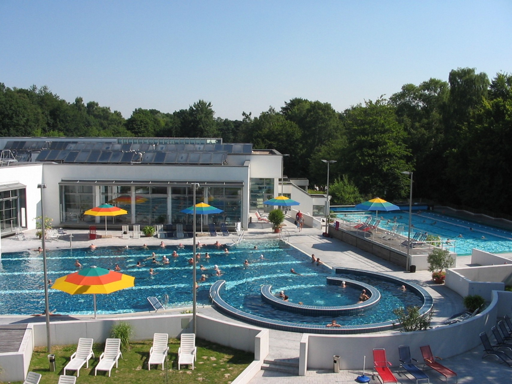 Deutschland - Nordrhein-Westfalen - Kreis Lippe - Bad Salzuflen: VitaSol